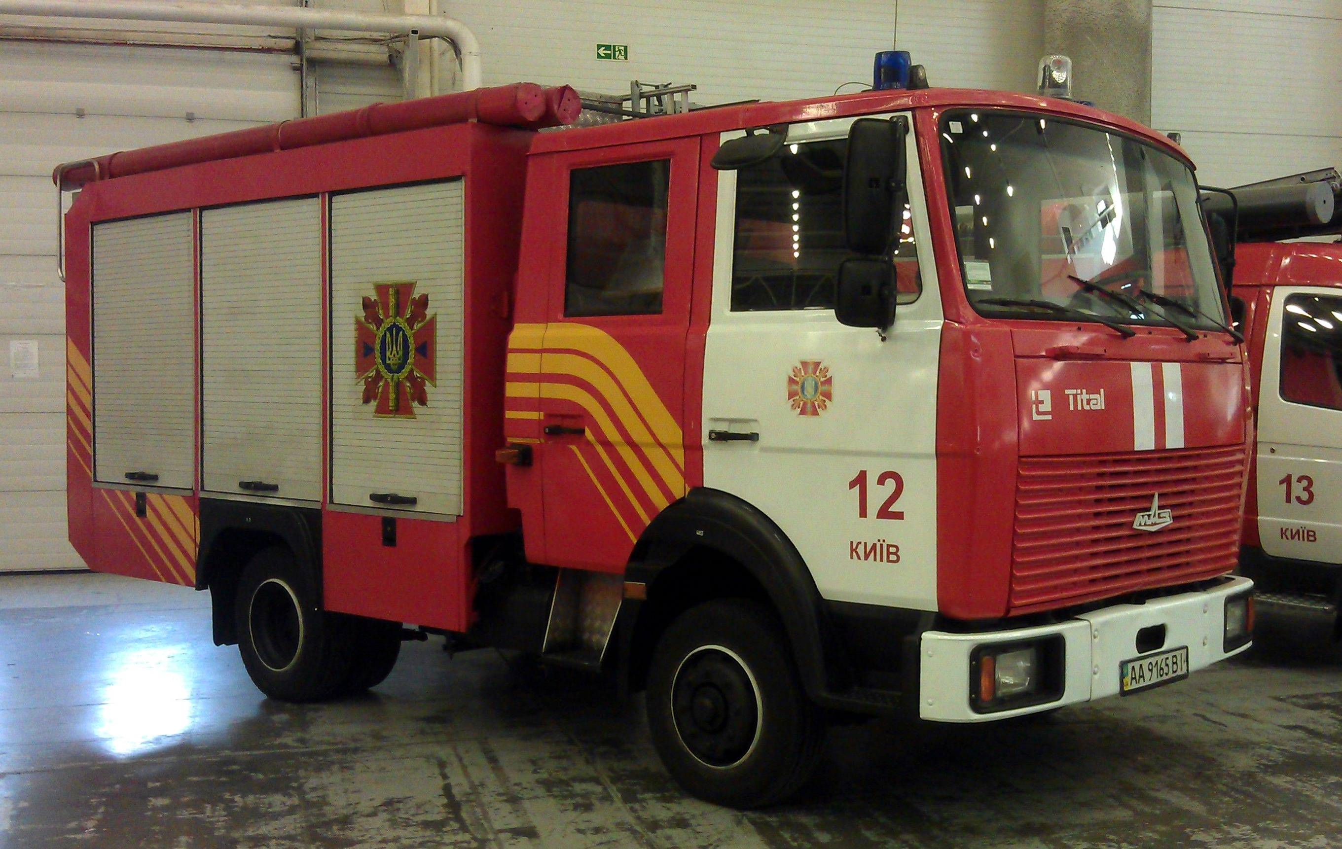 Пожарно-спасательный автомобиль комбинированного тушения АКТм на шасси МАЗ-4370 (4х2) в экспозиции Государственной службы Украины по чрезвычайным ситуациям. Выставка "Зброя та безпека", Киев, сентябрь 2015 г.